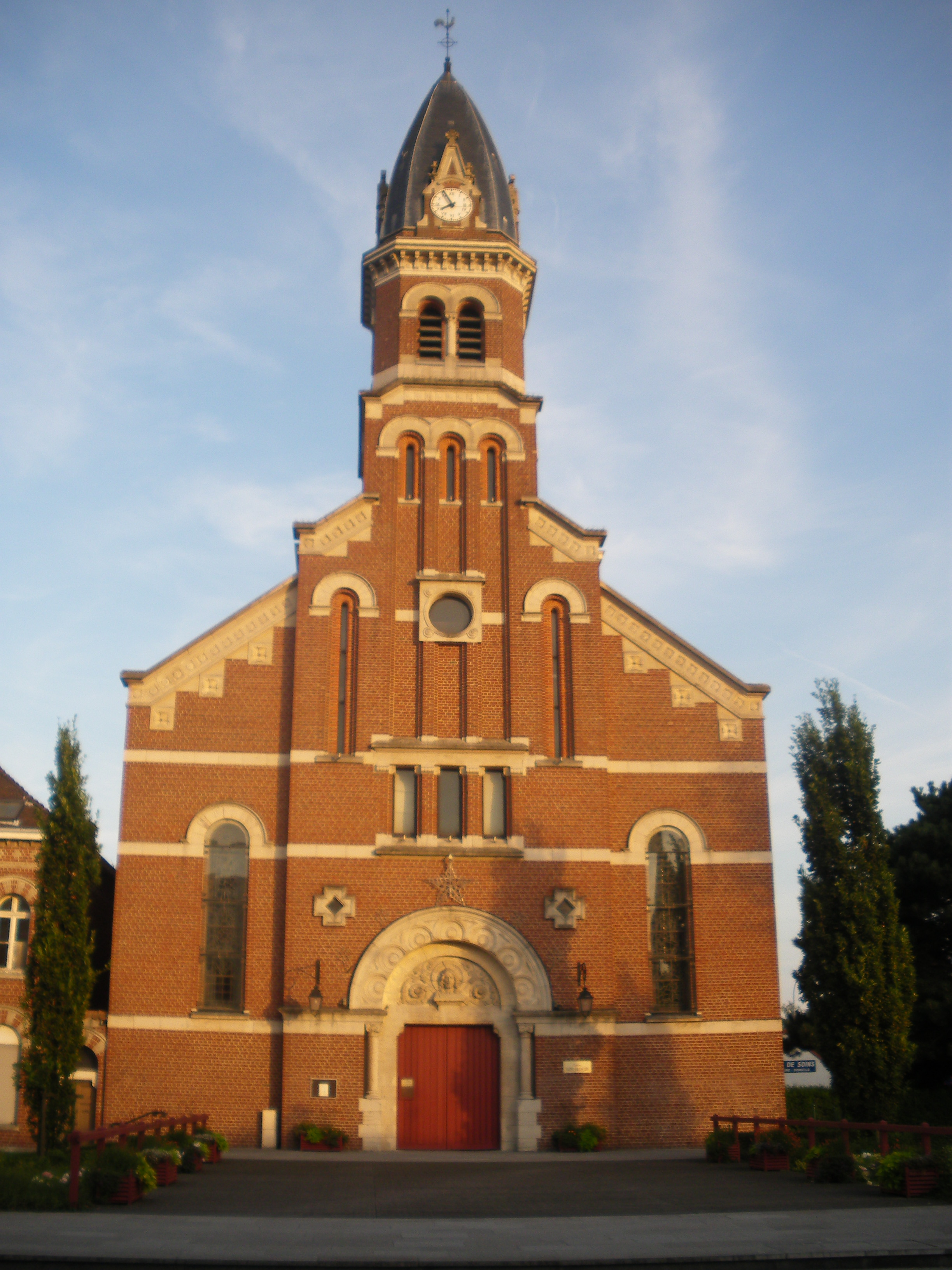 Vue de l'église Saint-François de Mouvaux dans le département du Nord.